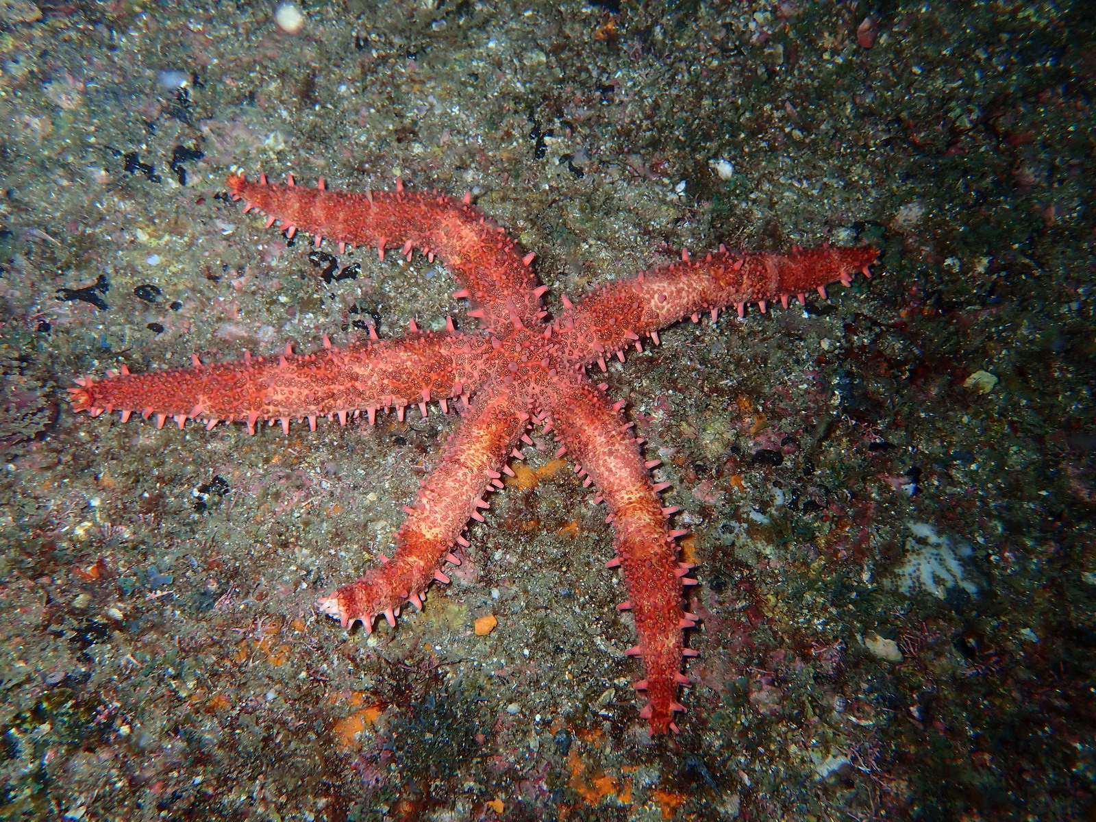 Mithrodia bradleyi observée dans le Golfe de Californie.